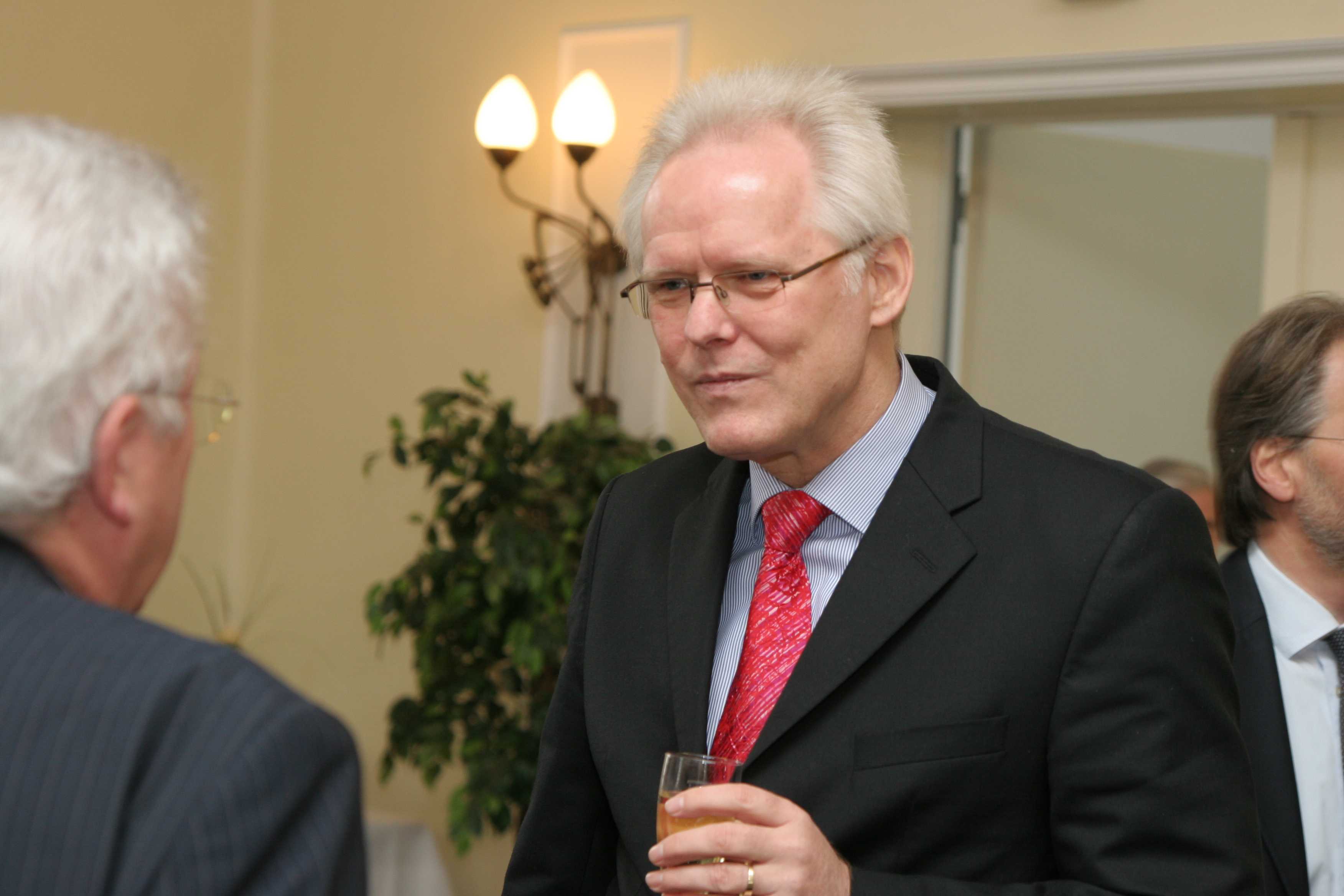 Helge Stadelmann, evangelikaler Theologe und Rektor der Freien Theologischen Hochschule Gießen (FTH) in Gießen, bei einem Empfang am 6. Dezember 2011 in Wetzlar